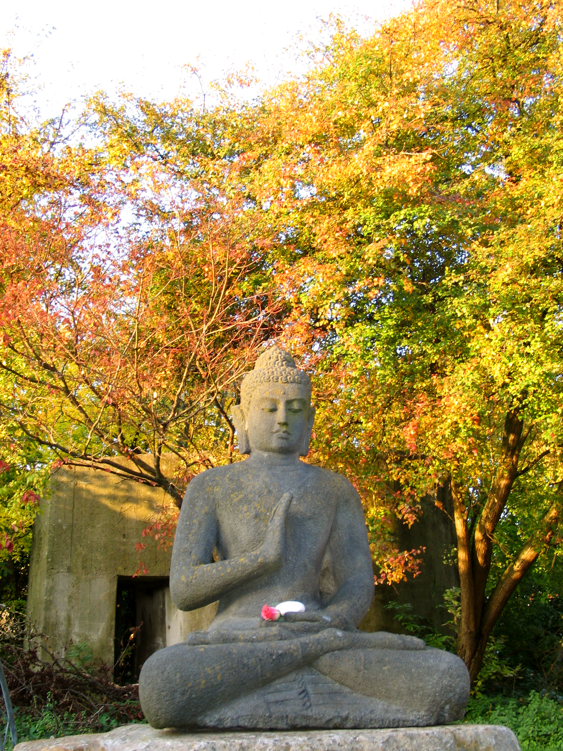 Die Buddha-Statue auf dem Gelände der ehemaligen Fuchswerke ist eine Statue aus dem Indonesischen Pavillon der Expo 2000 und sitzt vor dem ehemaligen Feuerwehrbunker ...